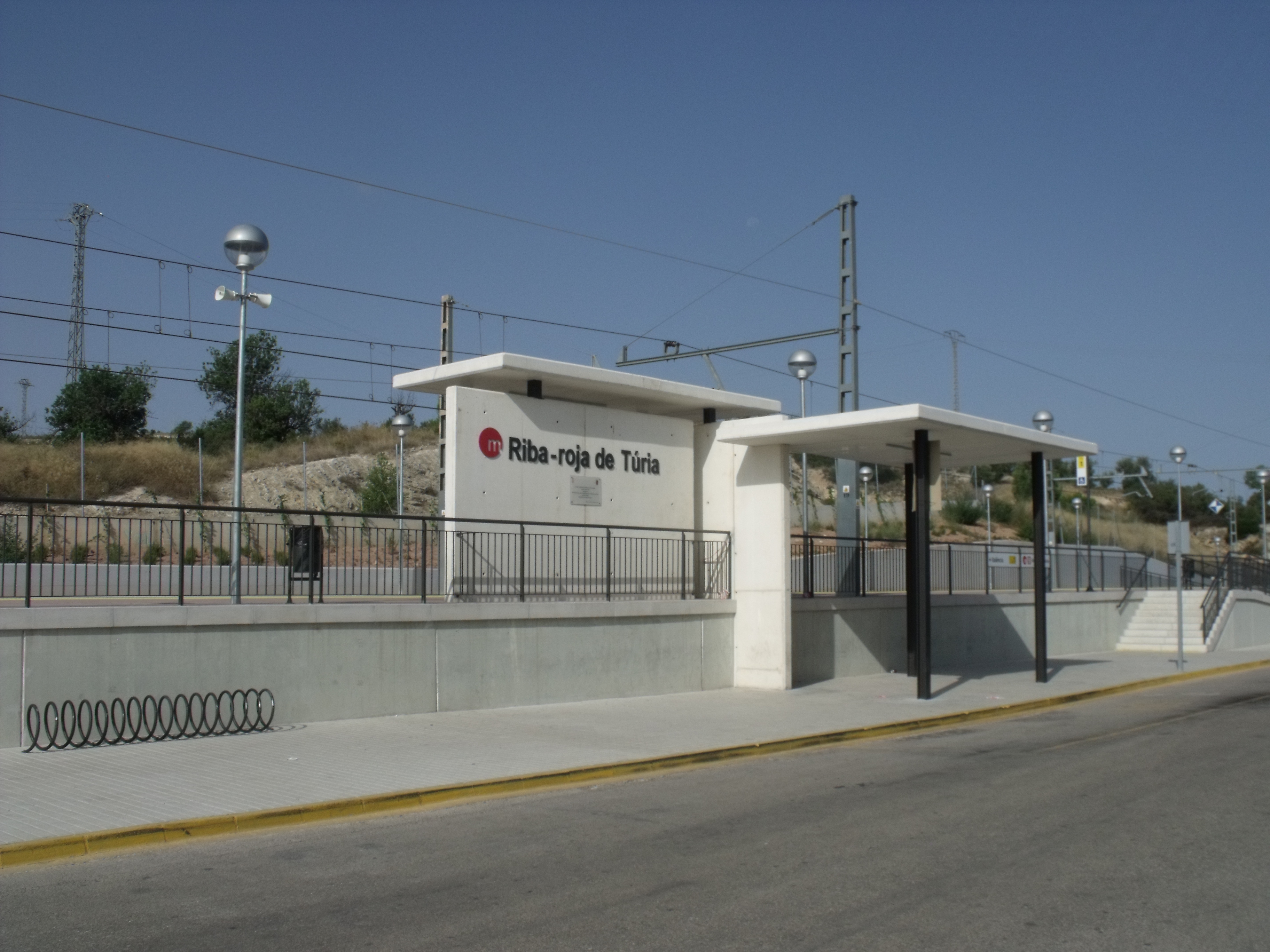 nueva estación de metro de Ribarroja.